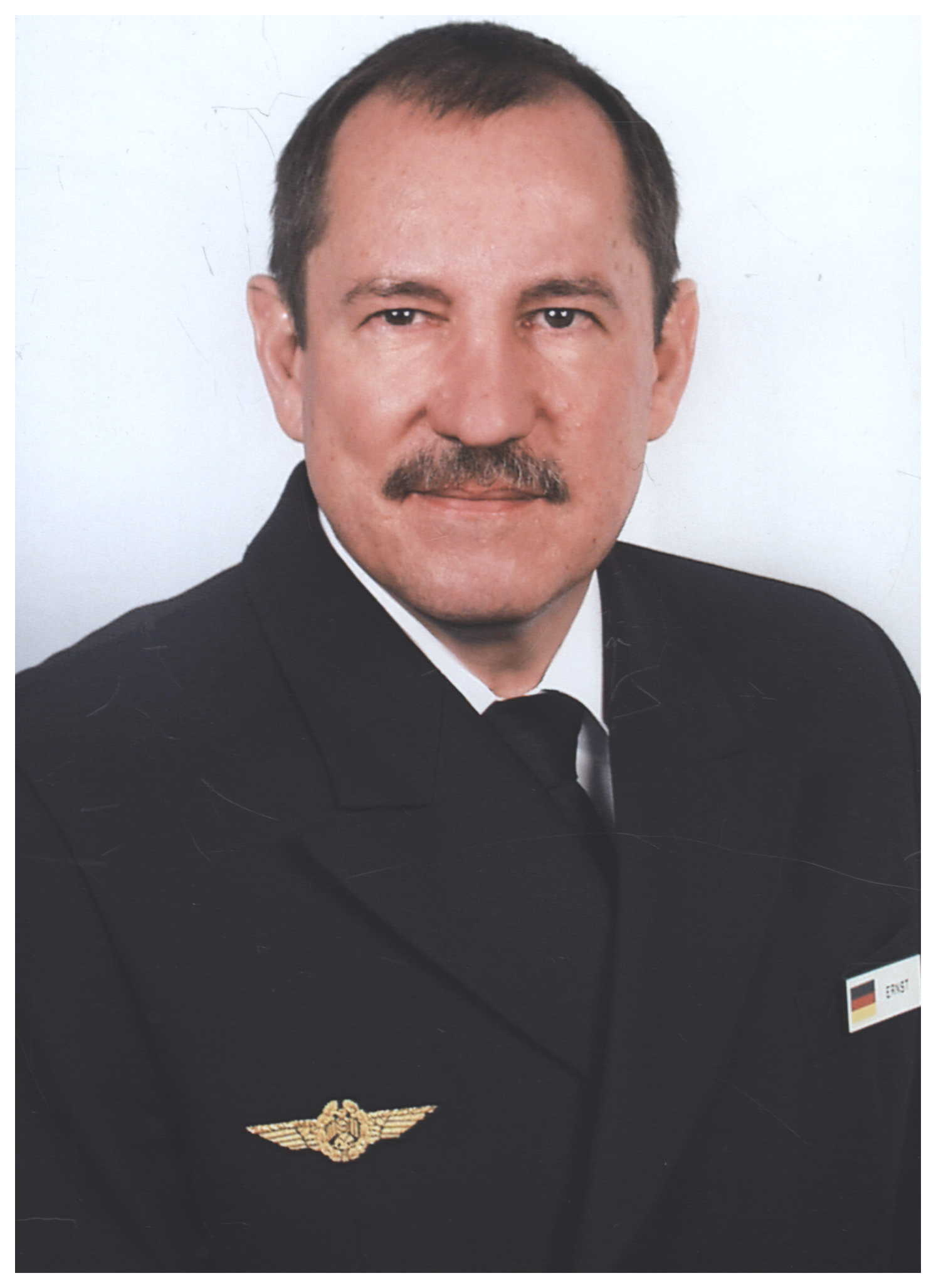 Porträtfotografie von Flottillenadmiral Thomas Ernst.